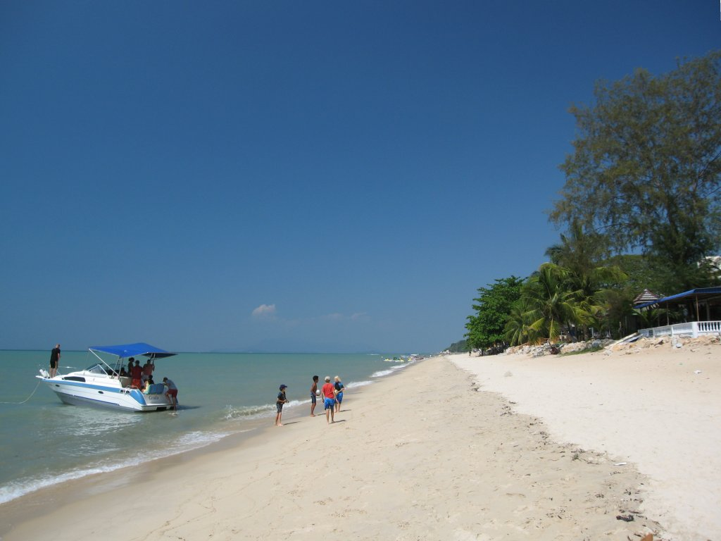 Batu Ferringhi Beach on Penang, Batu Ferringhi Strand auf Penang